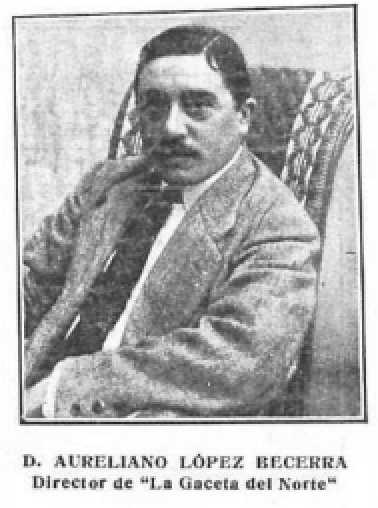 Aureliano Lopez Becerra, director de Gaceta del Norte